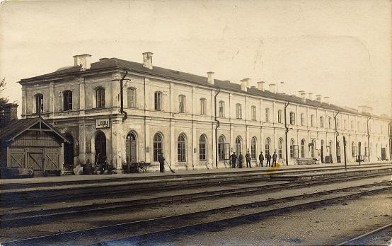 5 września 1939 roku został zbombardowany dworzec kolejowy w Łapach.